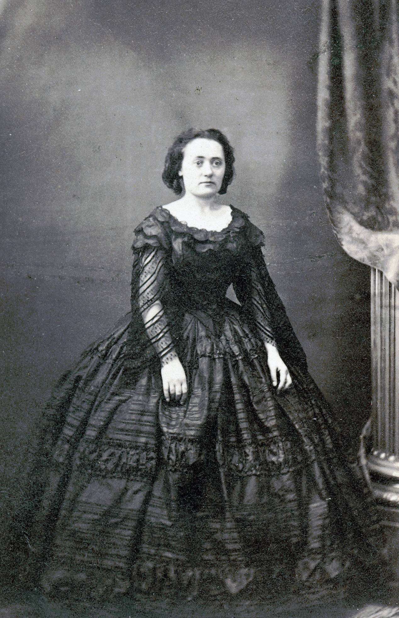 Freja Ryberg, skådespelare vid Pierre Delands sällskap 1860